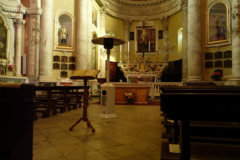 Chiesa della Natività di Maria, Diano Borganzo, Liguria, Italia